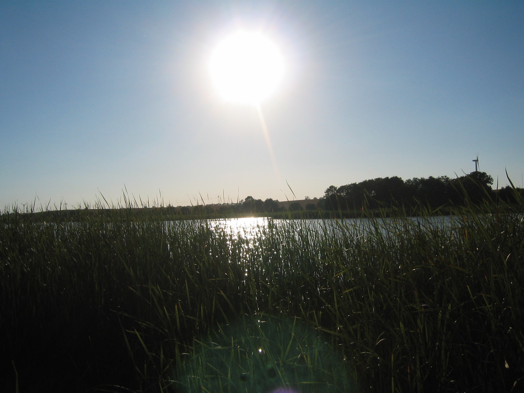 Der Baumgartener See in Baumgarten. See unzugänglich.